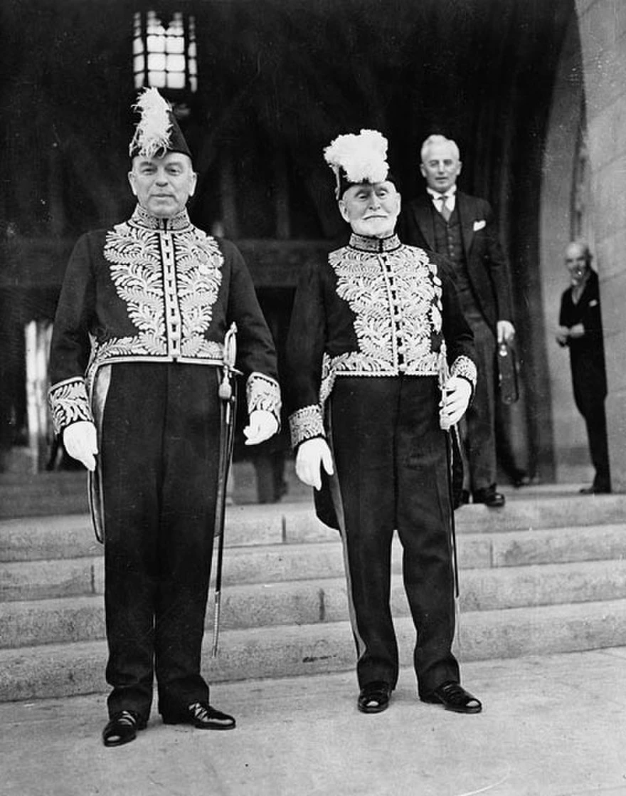 Rt. Hon. W.L. Mackenzie King and Senator Raoul Dandurand